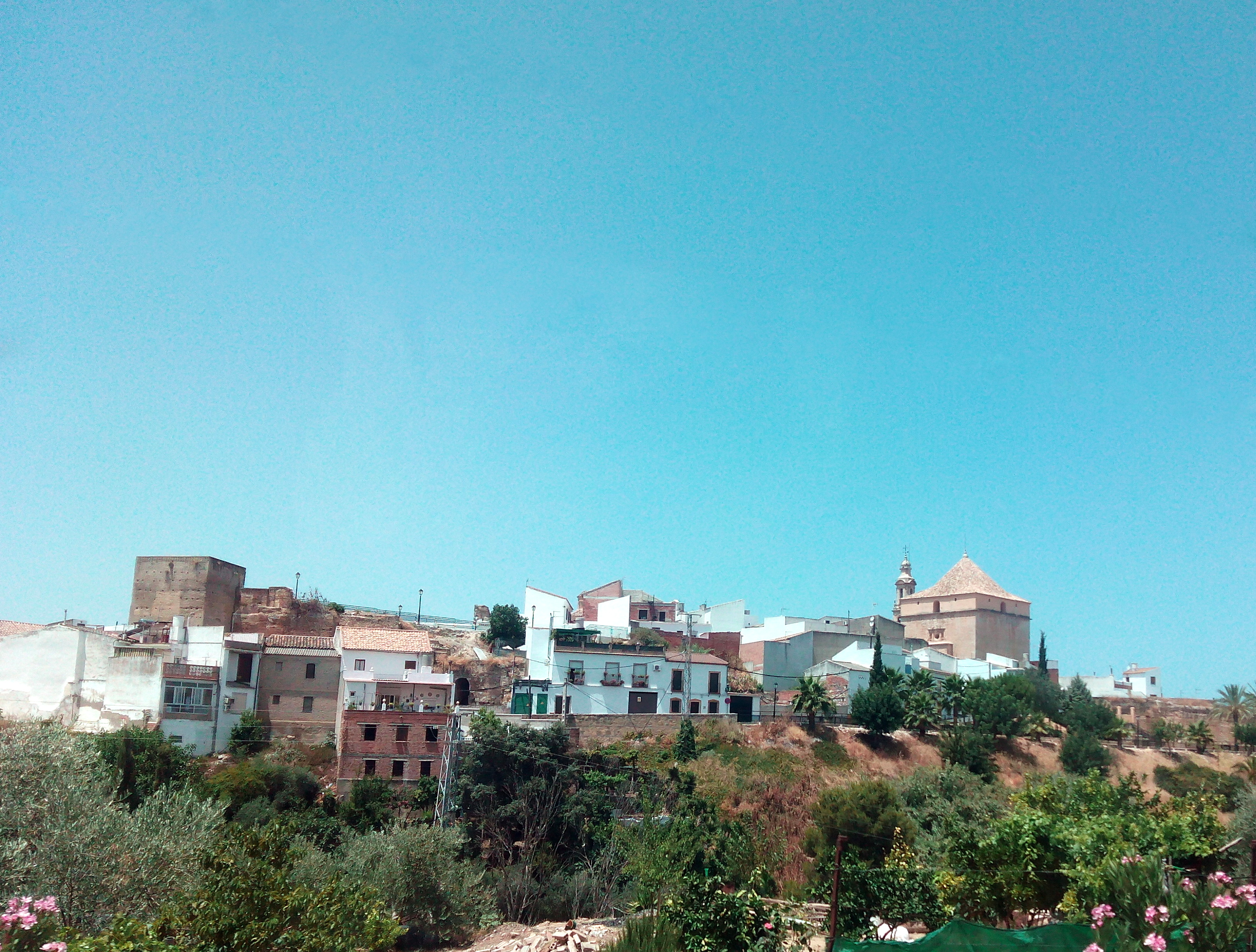 Vista de Santaella (España).